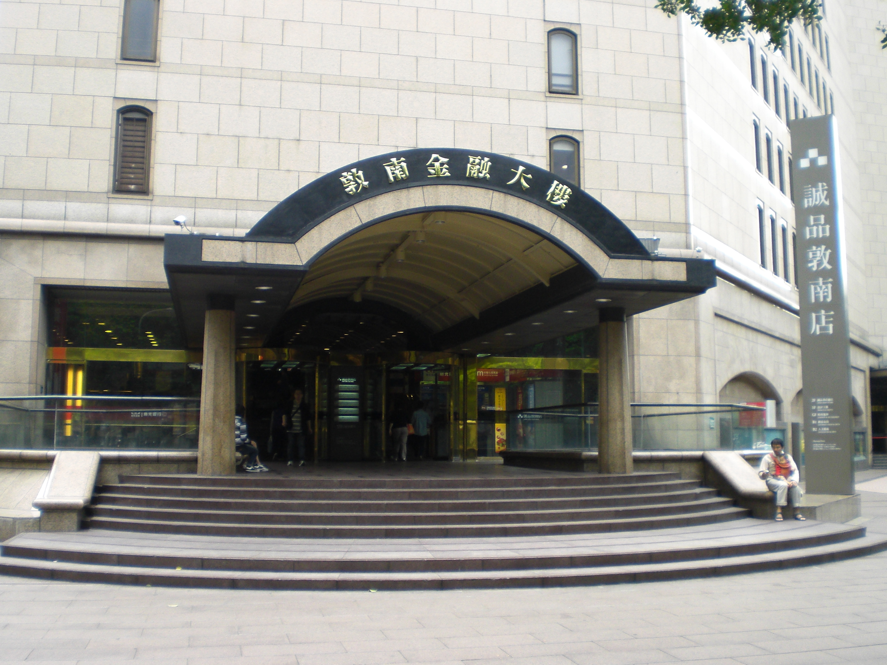 誠品書店敦南店，位於臺北市大安區敦化南路一段245號（敦南金融大樓）。